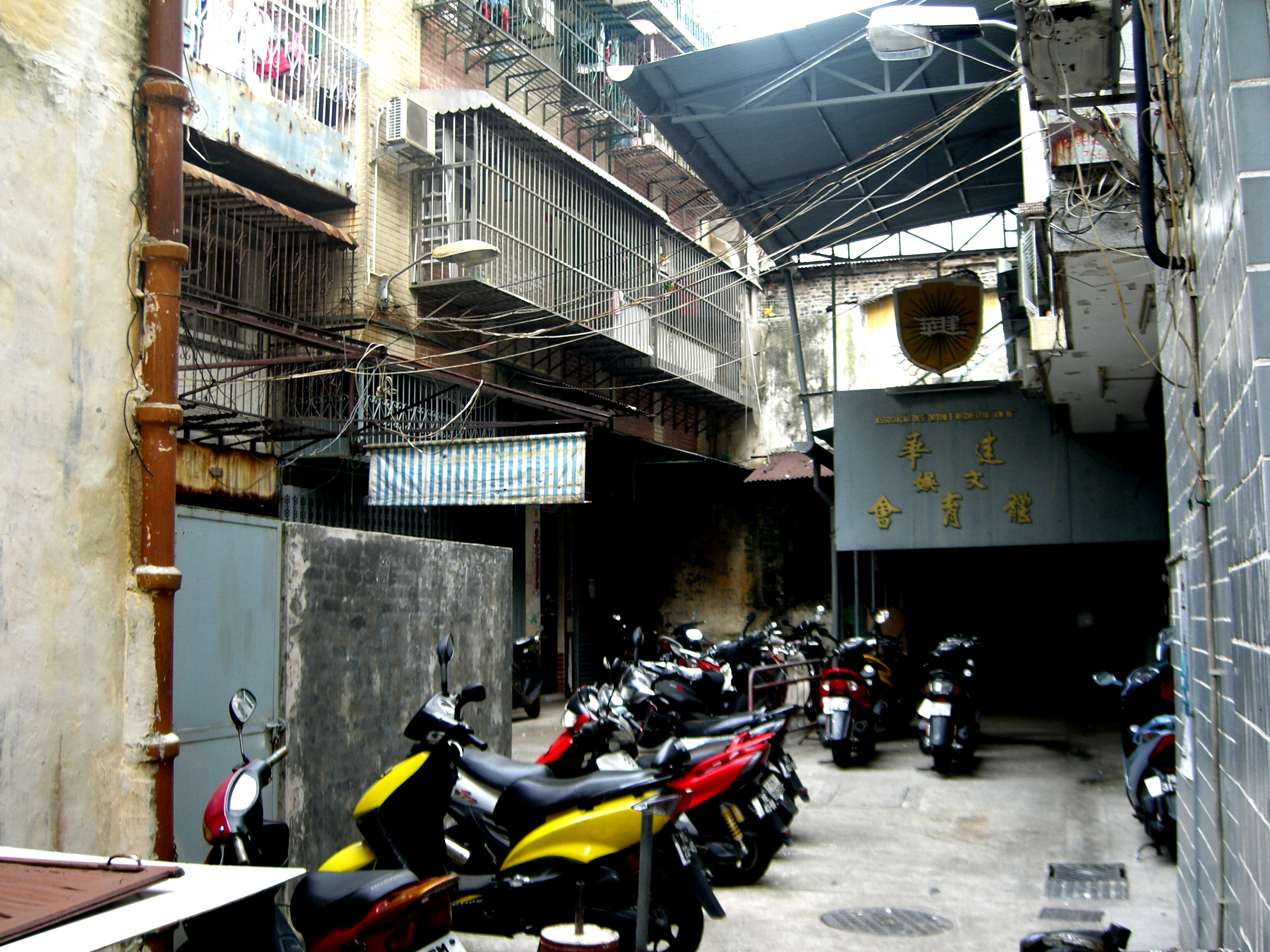 Beco dos Cotovelos